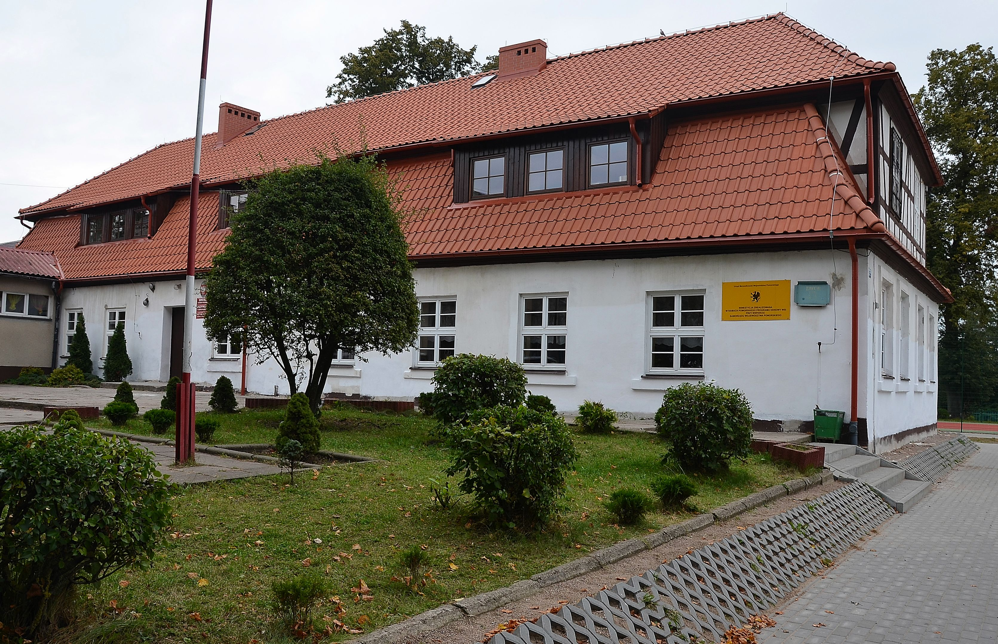 Stare Polaszki - dwór, obecnie szkoła, 1748